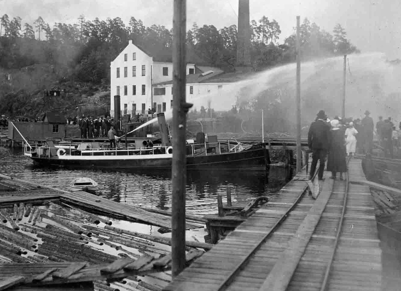 Sjöångsprutorna S:t Erik och Phoenix i Hägerstenshamnen. Den 20 juli 1920 inträffar en brand i Hägerstens tegelbruk och Örnsbergs lägenheter. Sjöångsprutorna deltog i släckningsarbetet